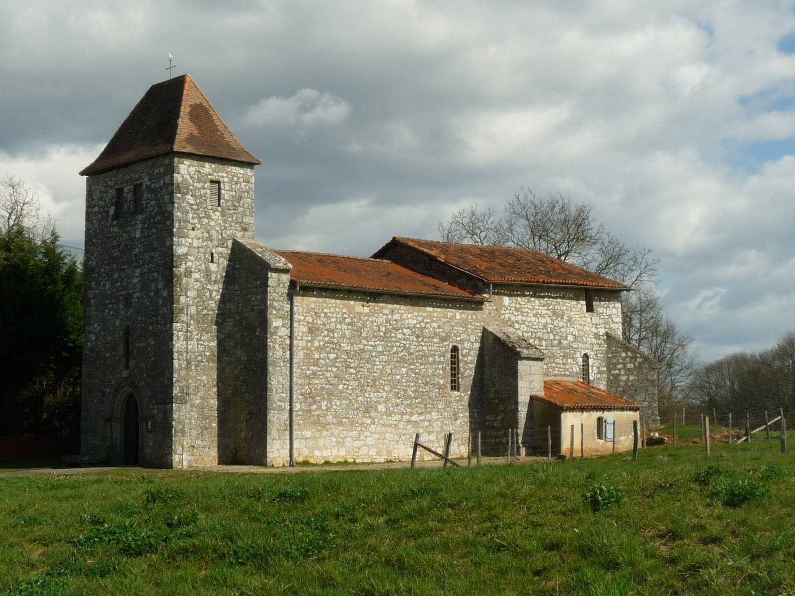 église de Lussac, Charente, France